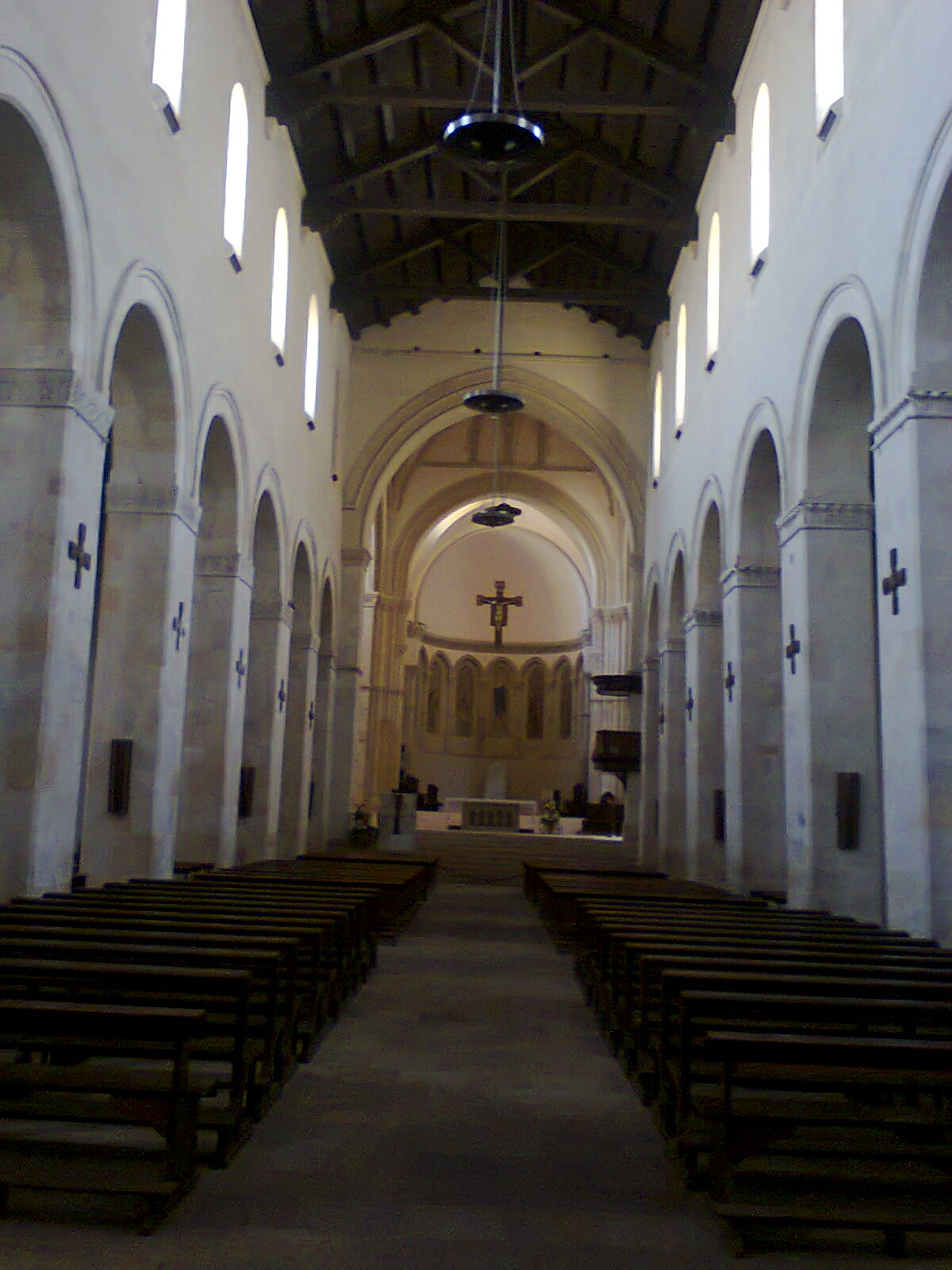 Foto scattata personalmente da Alfredo Ledonne il 3 Agosto 2012. Voglio che chiunque usi la foto mi riconosca come autore riportando il nome che ho indicato e che mantenga la stessa licenza per le opere derivate .